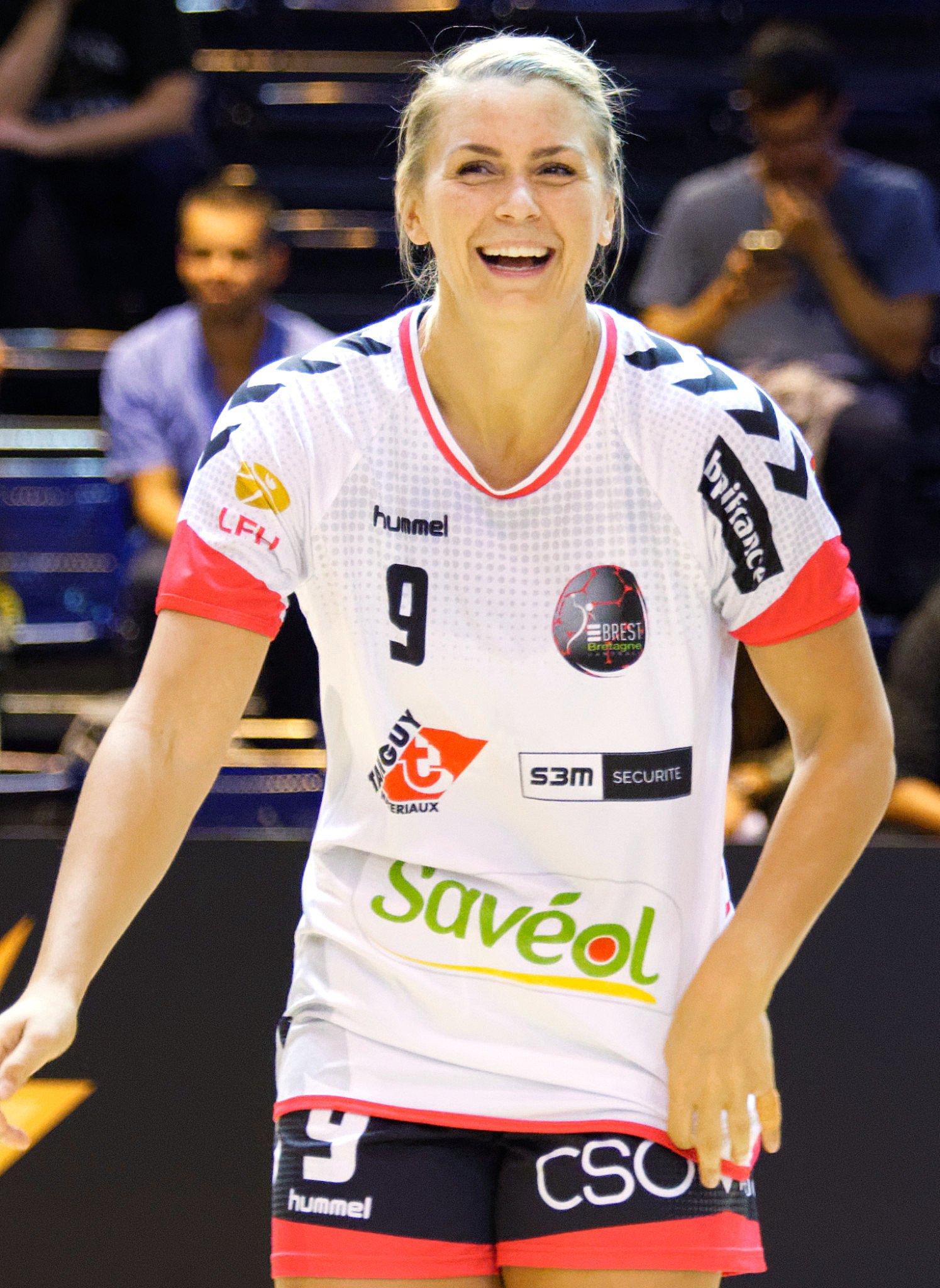 Rencontre de LFH entre Paris 92 et Brest Bretagne Handball. A la Halle Carpentier (Paris), le 05 septembre 2018.